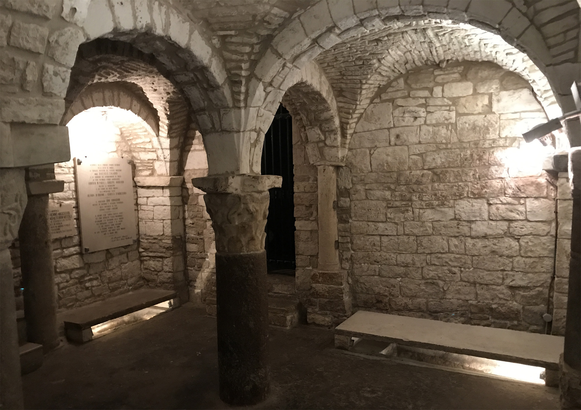 Mutmaßliche Gräber von Jolante von Brienne und Isabella von England in der Krypta vom Dom von Andria